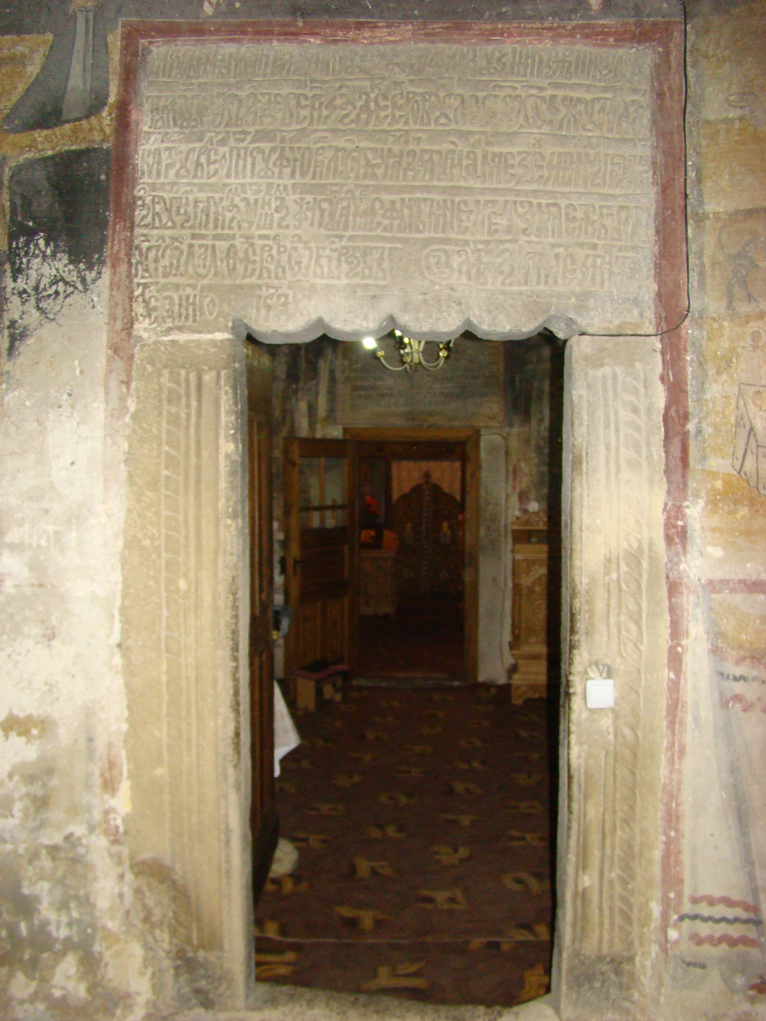 Ansamblul schitului Crasna, județul Gorj